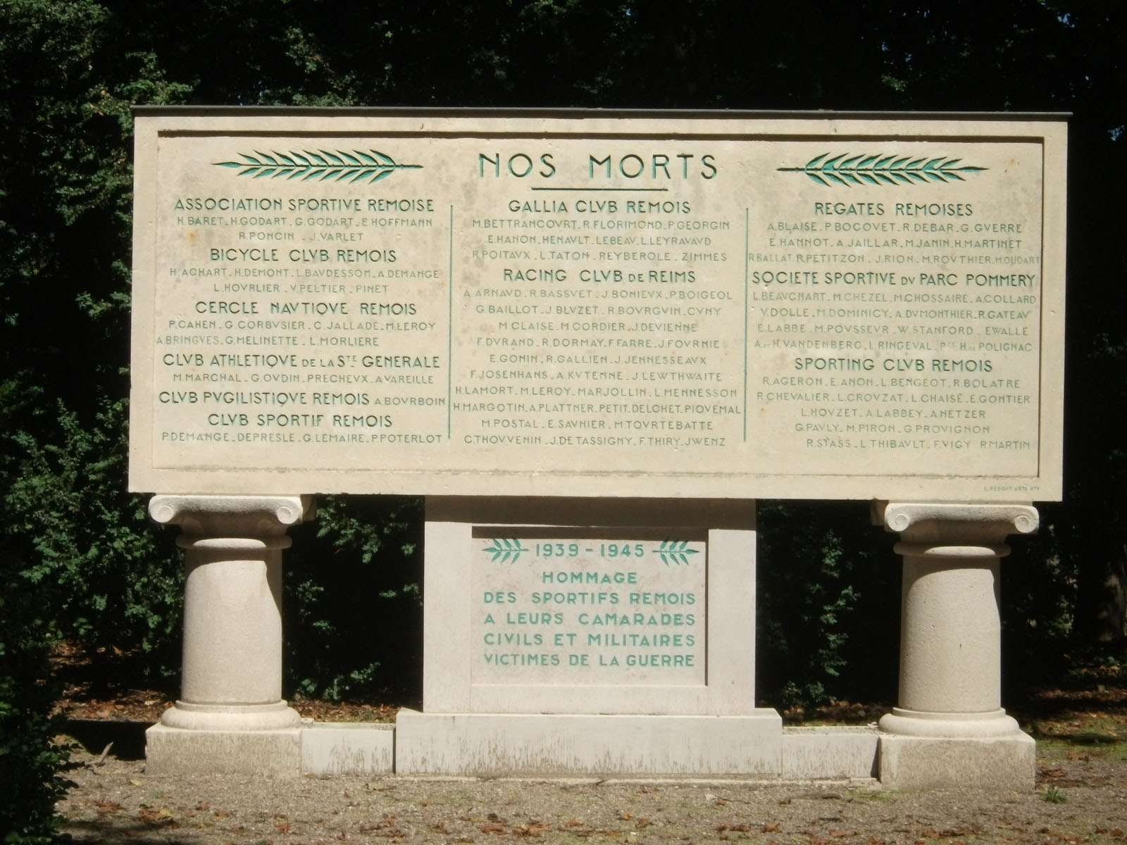 Vue d'un monument se trouvant dans la Parc de Champagne, ancien parc Pommery. L'ensemble du parc est classé monument historique. .